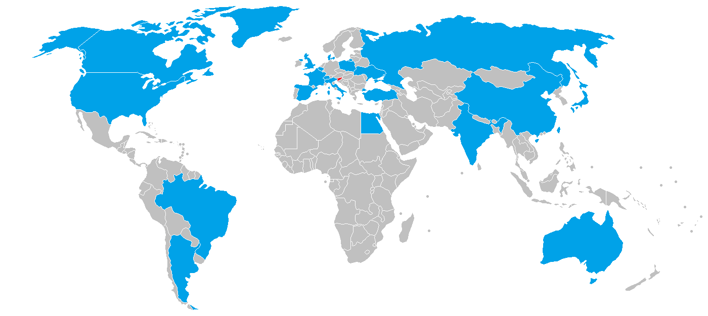 Države, v katerih so veleposlaniki, ki so akreditirani v več državah